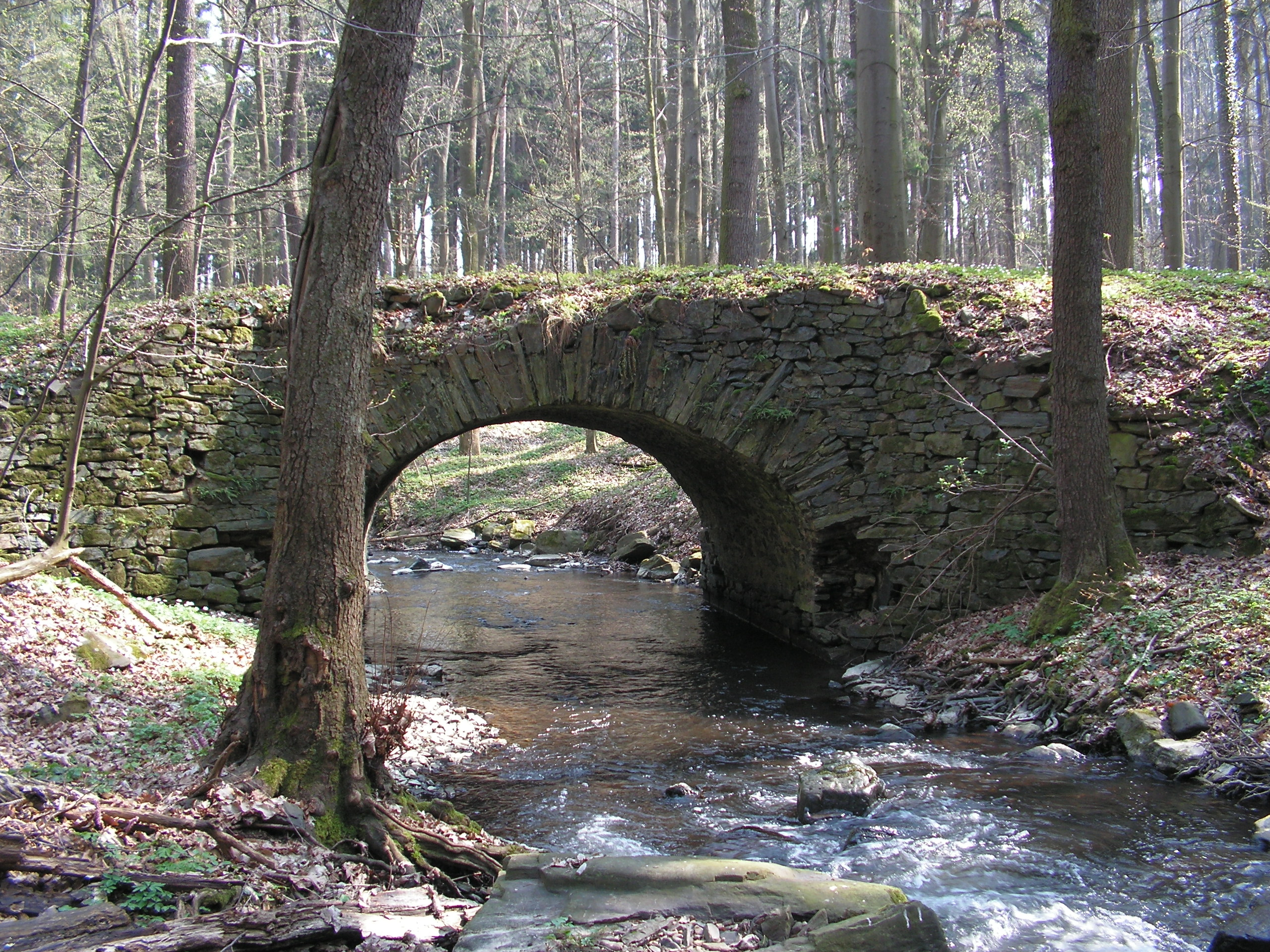 Starý most přes Paběnický potok pod obcí Hraběšín.